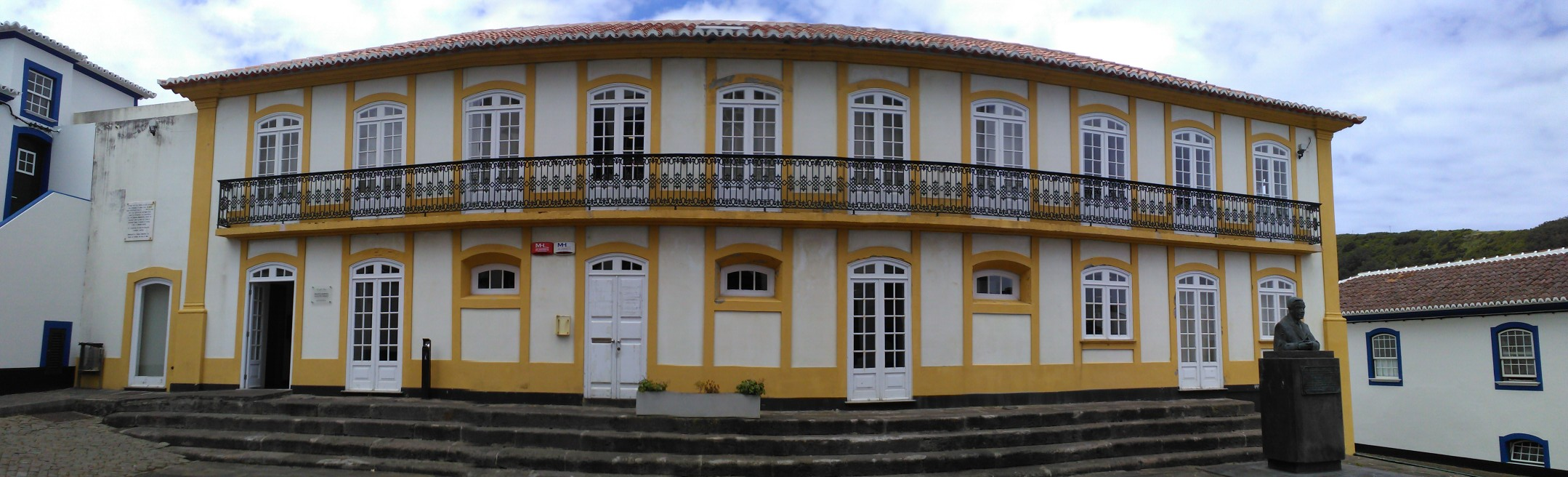 Casa das Tias de Vitorino Nemésio, freguesia de Santa Cruz, concelho de Praia da Vitória, ilha Terceira, Região Autónoma dos Açores, Portugal: vista panorâmica.